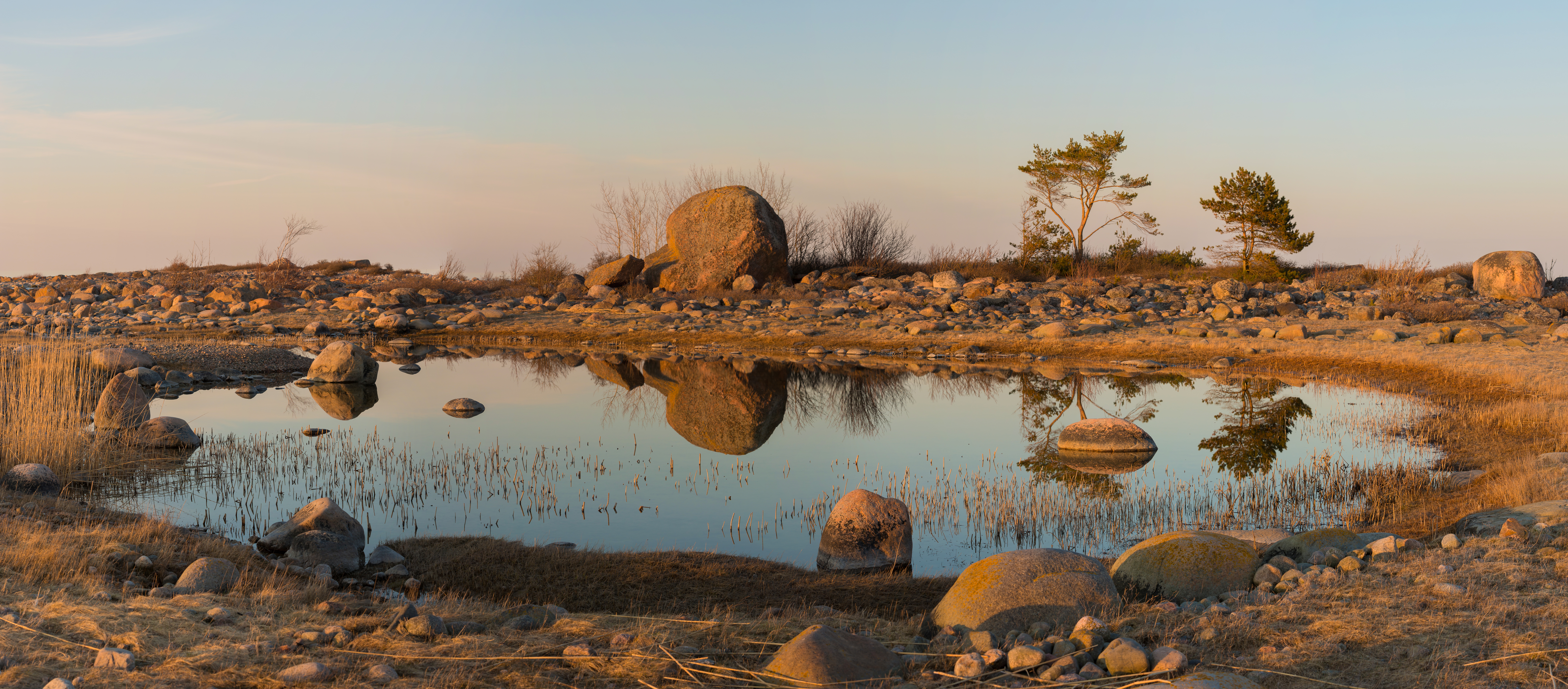 Purekari rändrahn; (Purekari neeme rändrahn)